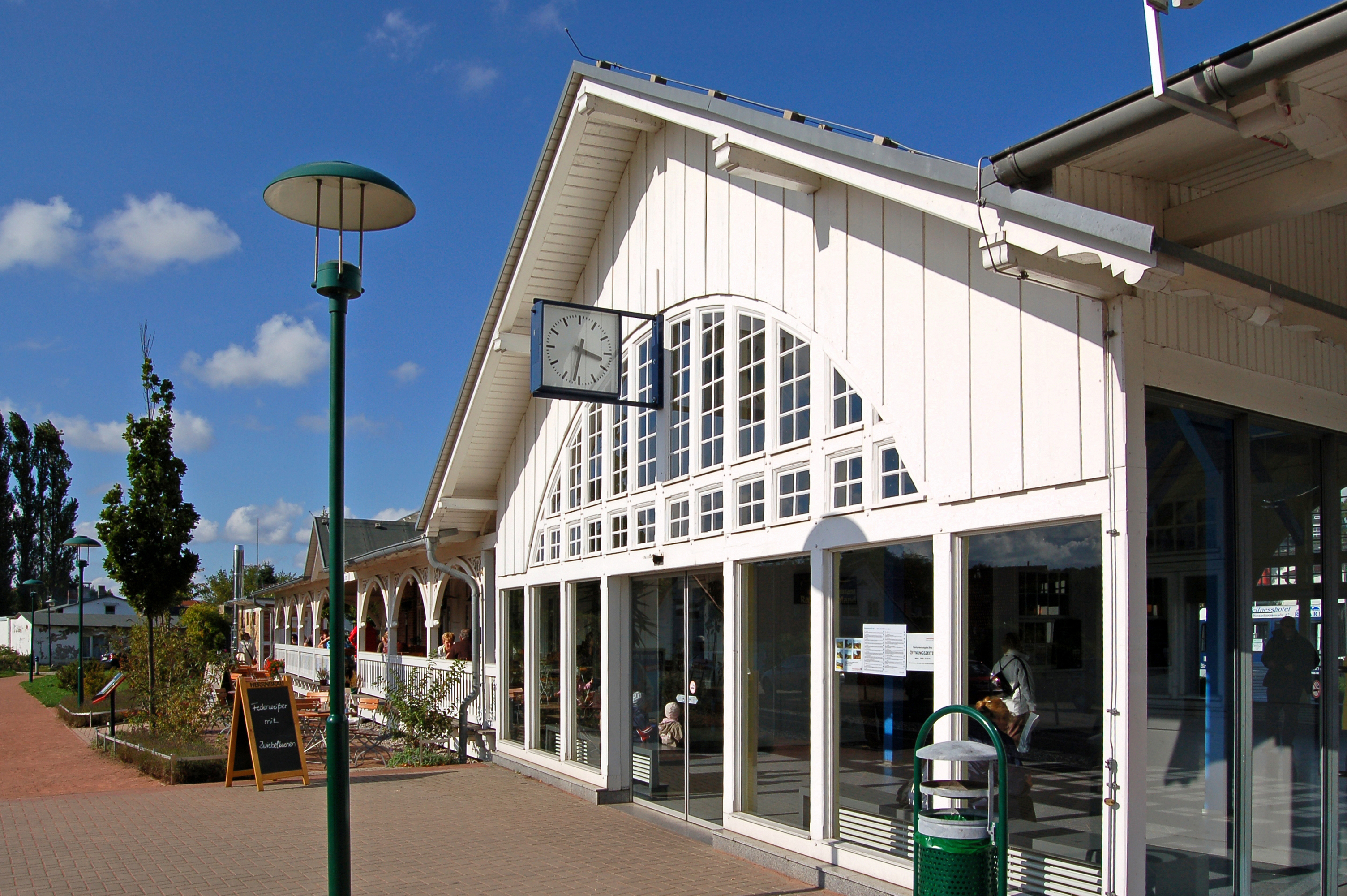 Der neugestaltete Kleinbahn-Bahnhof Binz (Rügen) lo(c)kt wieder die Touristen. Von hier aus geht's im Stundentakt Richtung Göhren, Putbus oder Lauterbach.